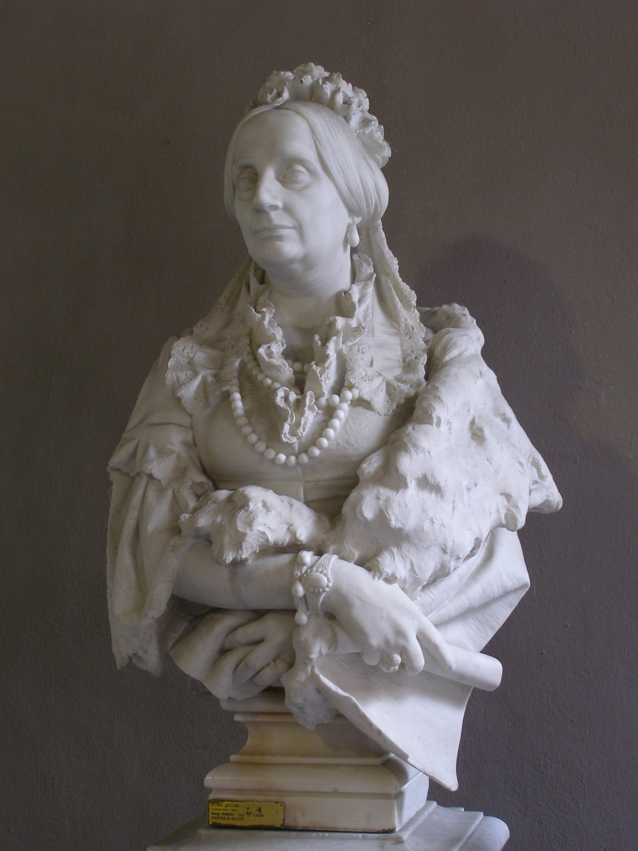 Vittorio Lavezzari - Maria Brignole-Sale De Ferrari - duchessa di Galliera